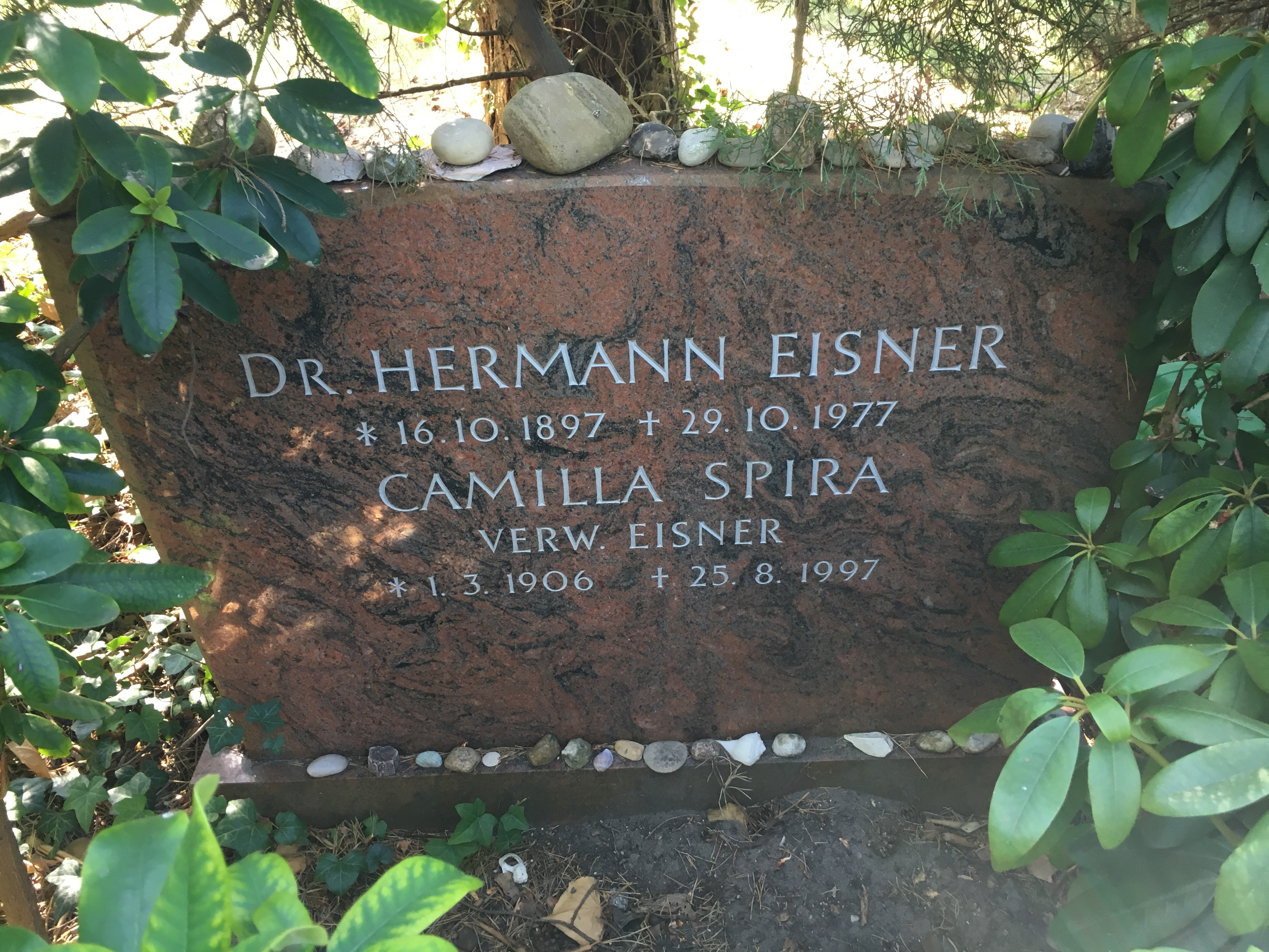 Grabstein von Camilla Spira und Hermann Eisner